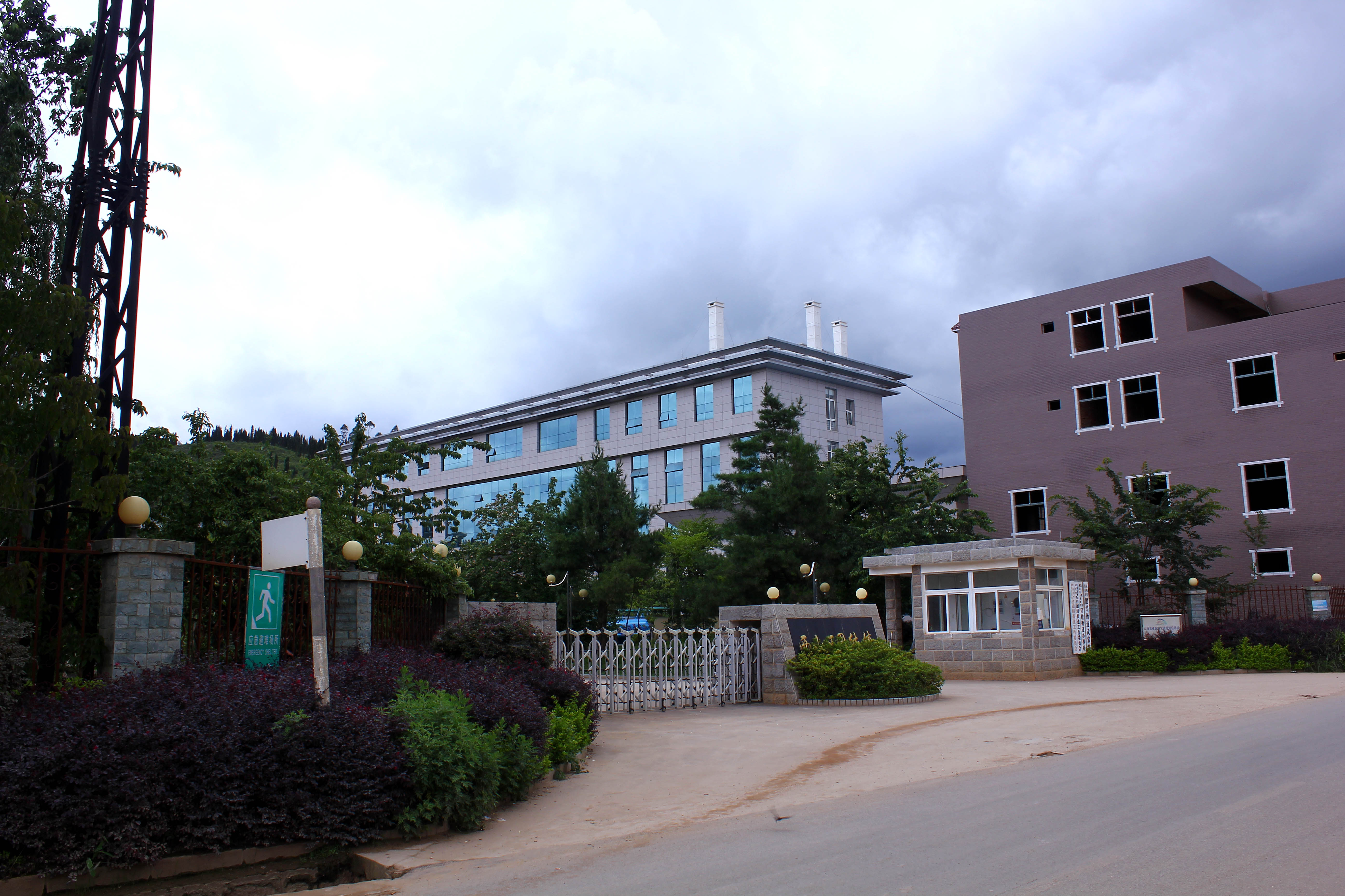 云南省昆明市西山区团结镇（现为团结街道）镇政府。